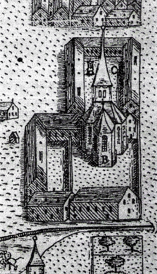 ehemalige ev. Dreifaltigkeitskirche, ab 1604 Jesuitenkirche St. Peter und Paul, Richtung Westen gesehen. Ausschnitt aus dem Klagenfurter Stadtplan, erstellt von Christoph Senfft, veröffentlicht als Beilage zu Urban Paumgartners "Aristeion Carinthiae, Claudiforum", Lauingen 1605